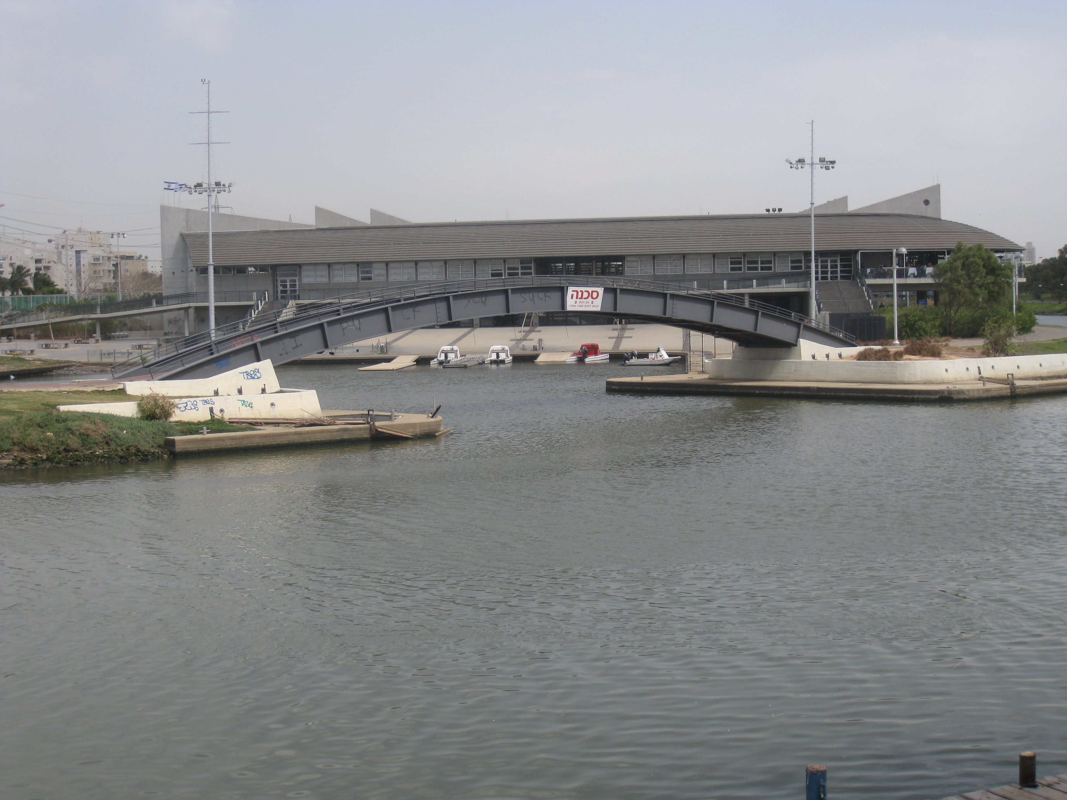 The Yarkon Park פארק הירקון בית הסירות